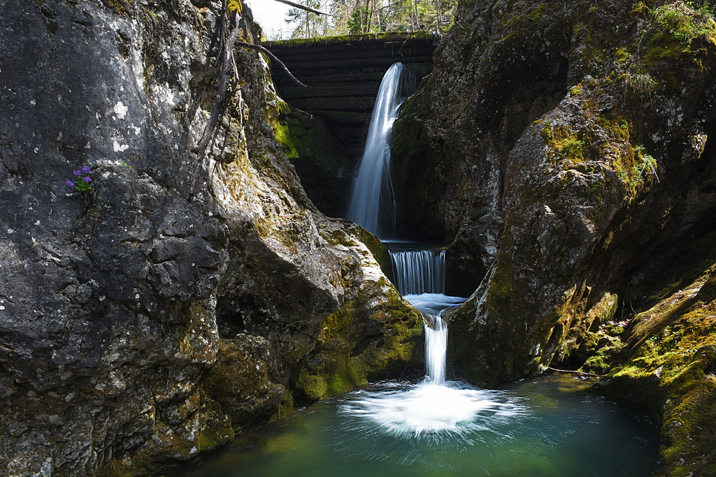 Brdarjev slap na Gačniku